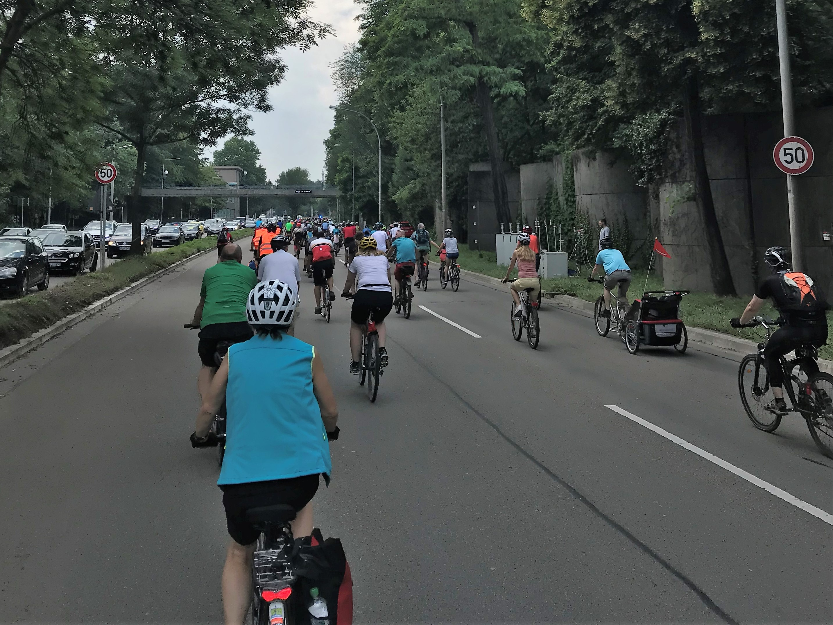 ADFC Radsternfahrt Stuttgart am 10.6.2018 Auf der B14 Cannstatter Straße